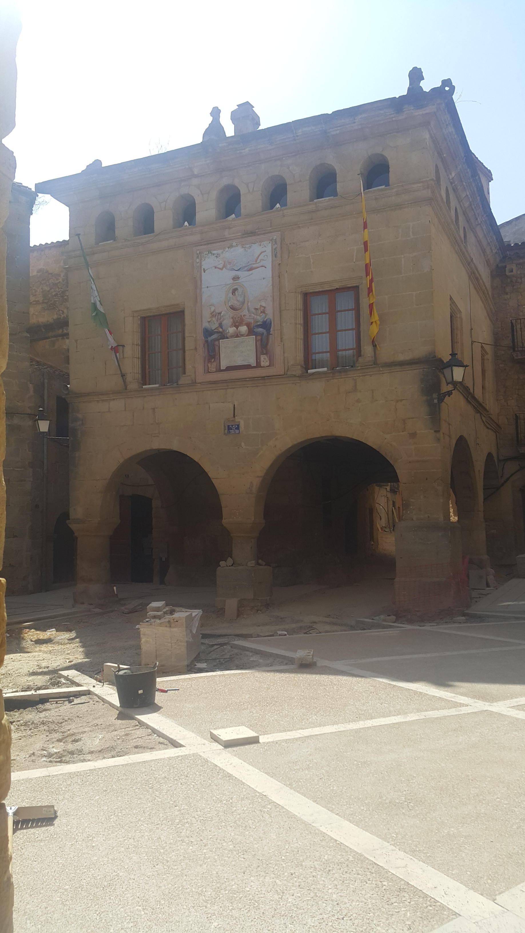 Catalonia Terra Alta Horta de Sant Joan Ajuntament